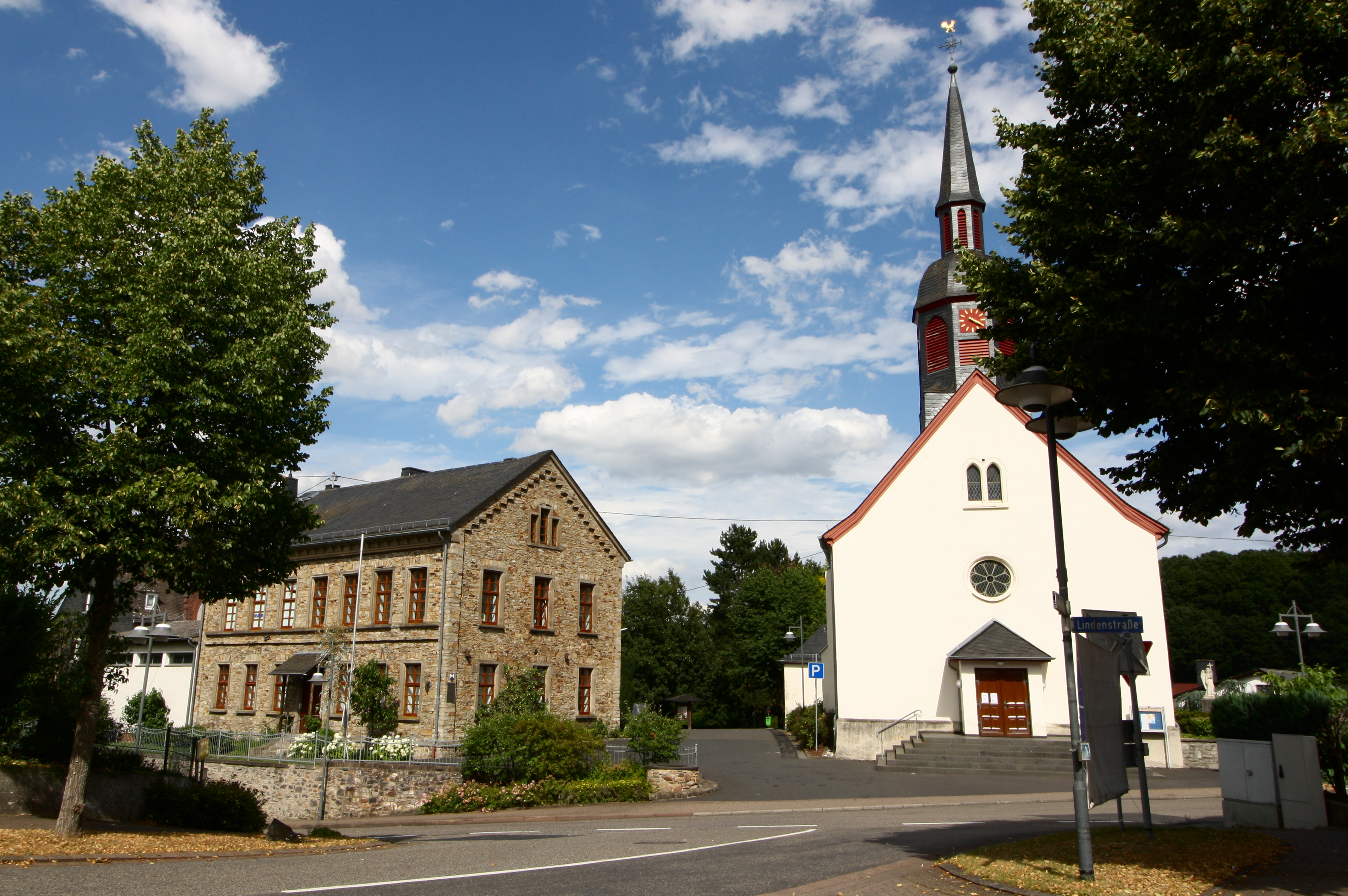 Holler, Westerwald, Rheinland-Pfalz, Deutschland